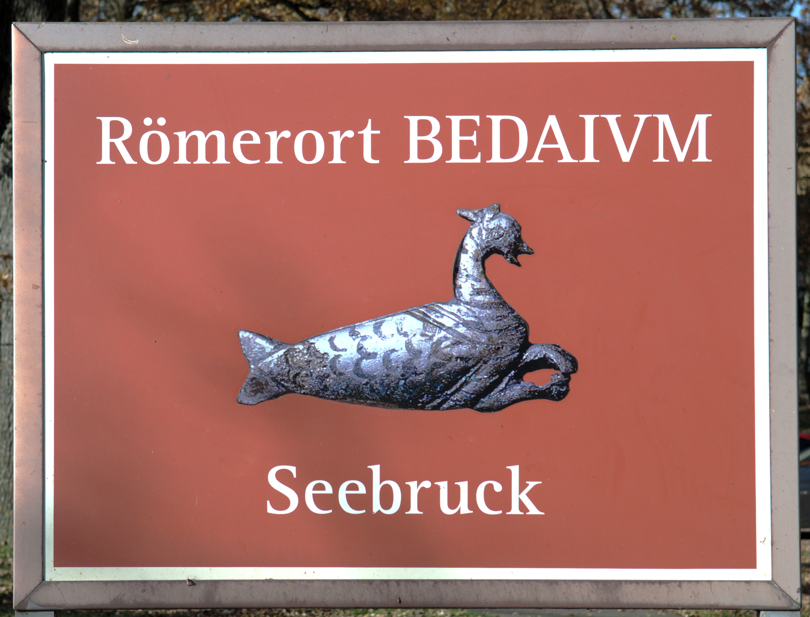 Hinweistafel am Ortseingang von Seebruck, ehemals römischer Stützpunkt Bedaium.